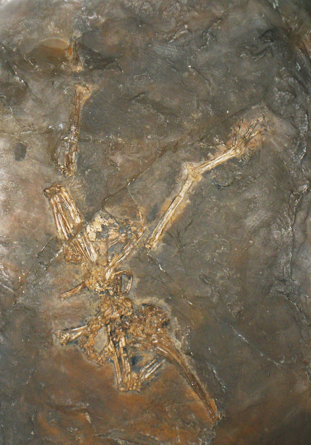 Fossil of Rhynchaeites, an extinct bird- Took the photo at Senckenberg Museum of Frankfurt